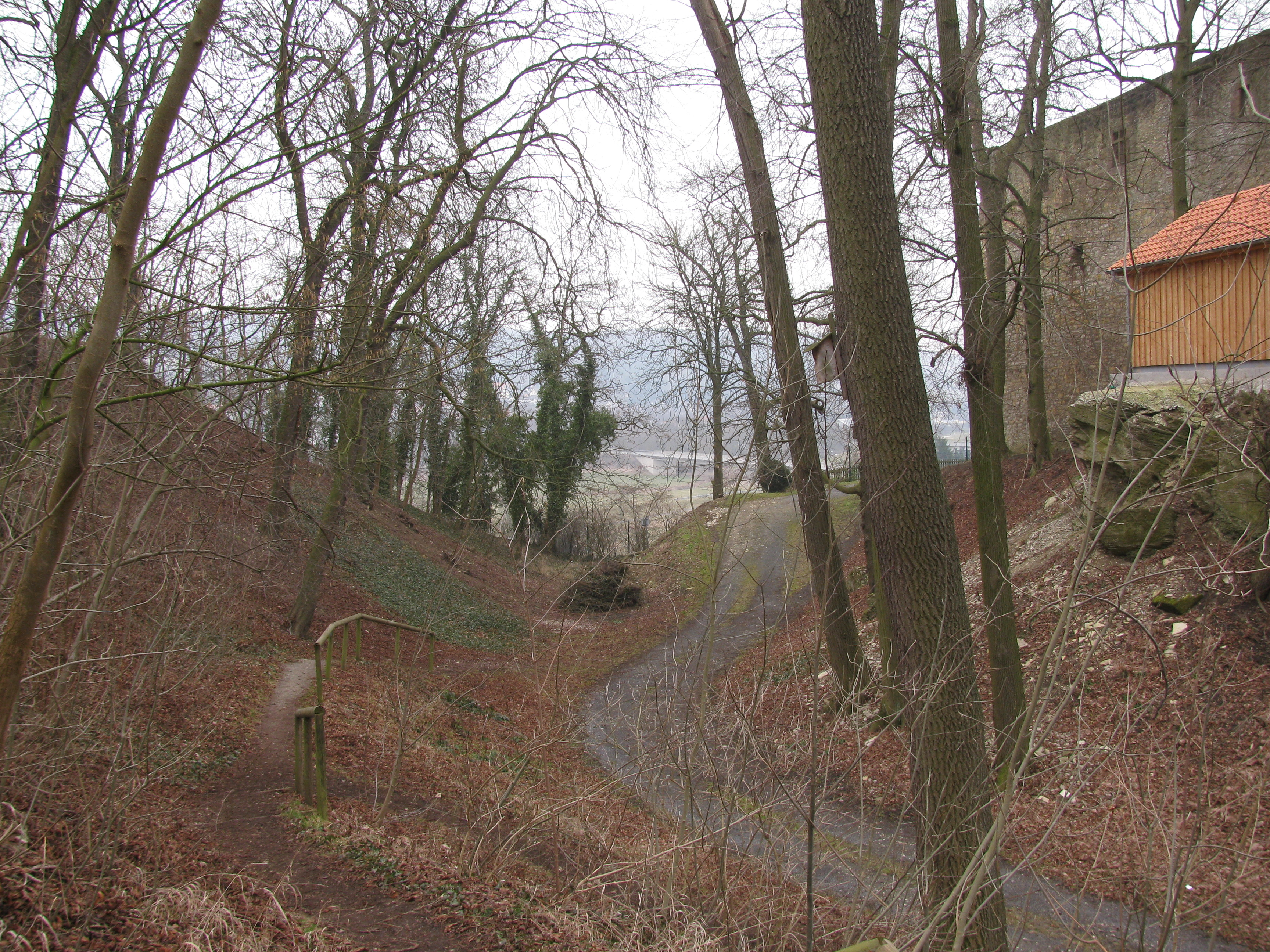 Burgruine Salzderhelden, Halsgraben an der Nordseite der Burg.